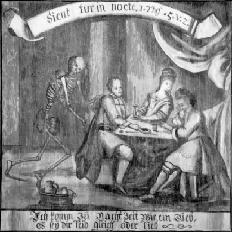 Totentanz von Wondreb, Ausschnitt